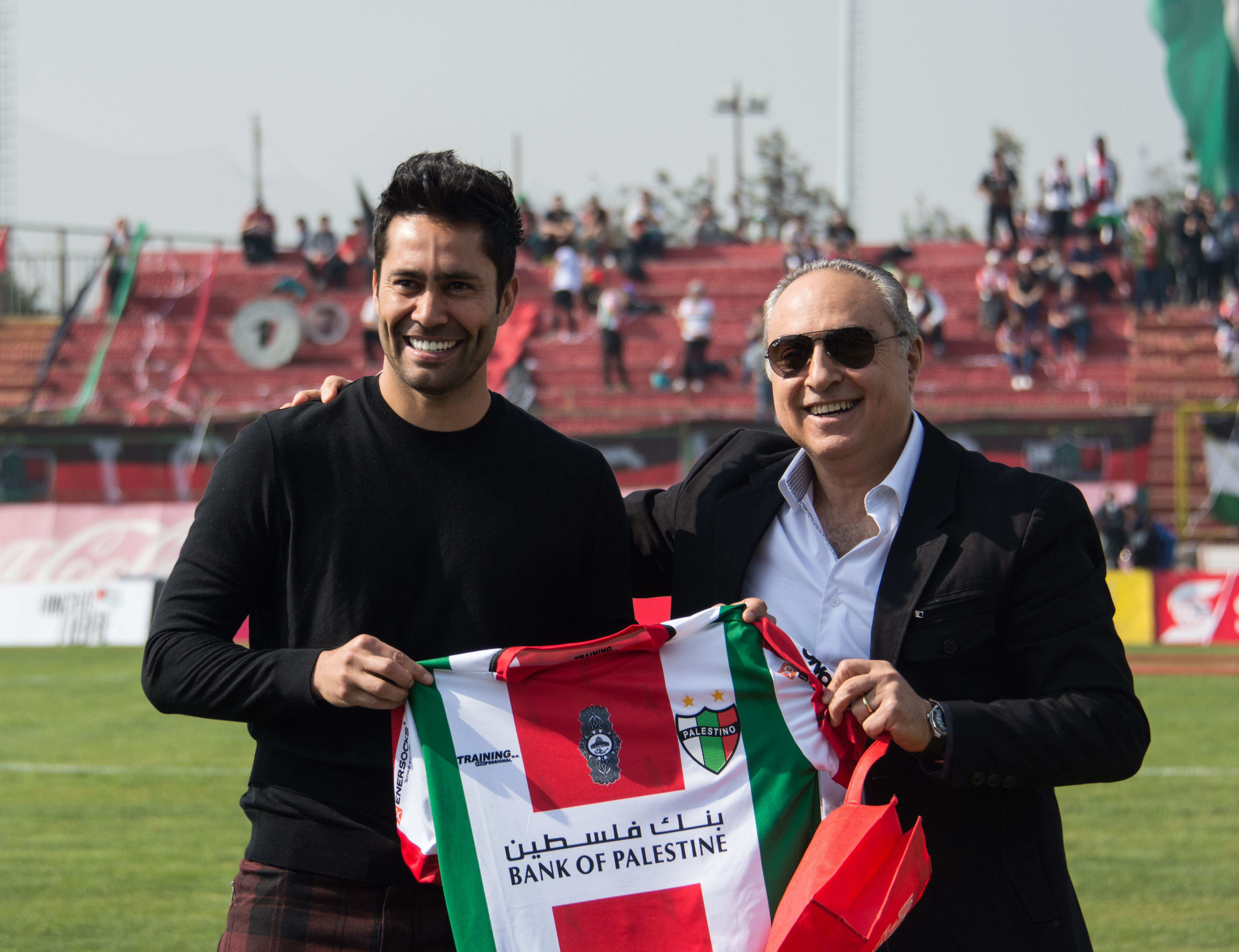 Luis Jiménez y Jorge Uauy, Palestino v Deportes Temuco, Estadio Municipal de La Cisterna, La Cisterna, Santiago, Chile